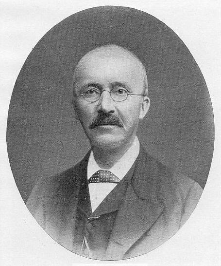 Heinrich Schliemann.